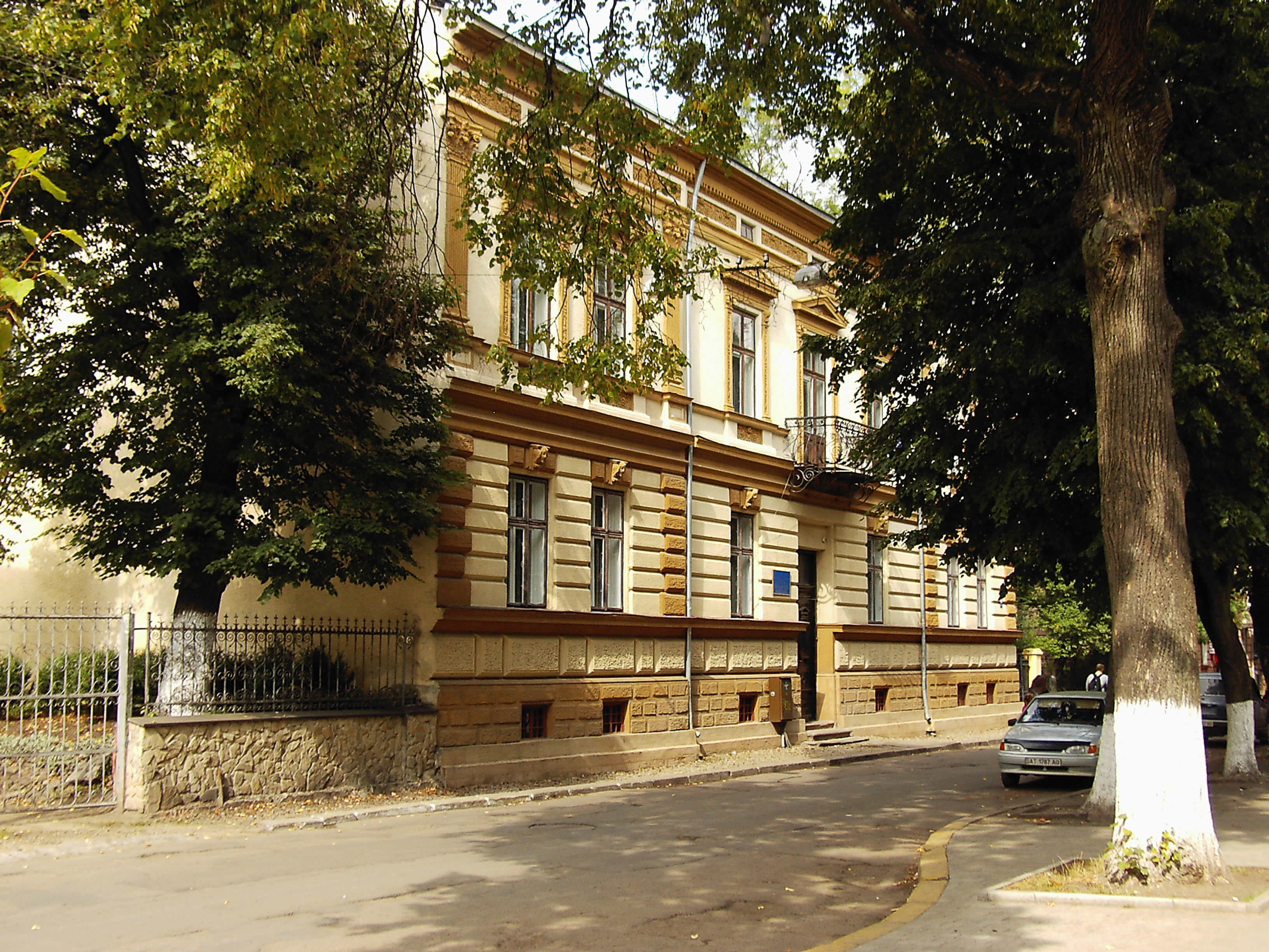 Прикарпатський національний університет ім.Василя Стефаника . Економічний факультет.м. Івано-Франківськ